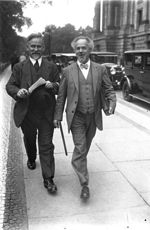 Der deutsche Reichstag aufgelöst ! Momentaufnahme vor dem Reichstag am Tag der Auflösung am 18. Juli mittags 1 Uhr ! Lächelnd verlassen die beiden sozialdemokratischen Abgeordneten Dittmann (links) und Crispien (rechts) den Reichstag nach der Auflösung.